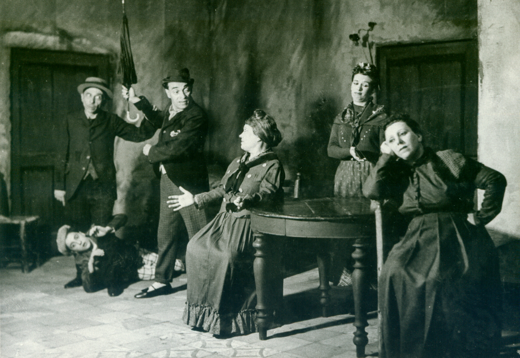 foto di scena di Viviani in Miseria e nobiltà di Eduardo Scarpetta